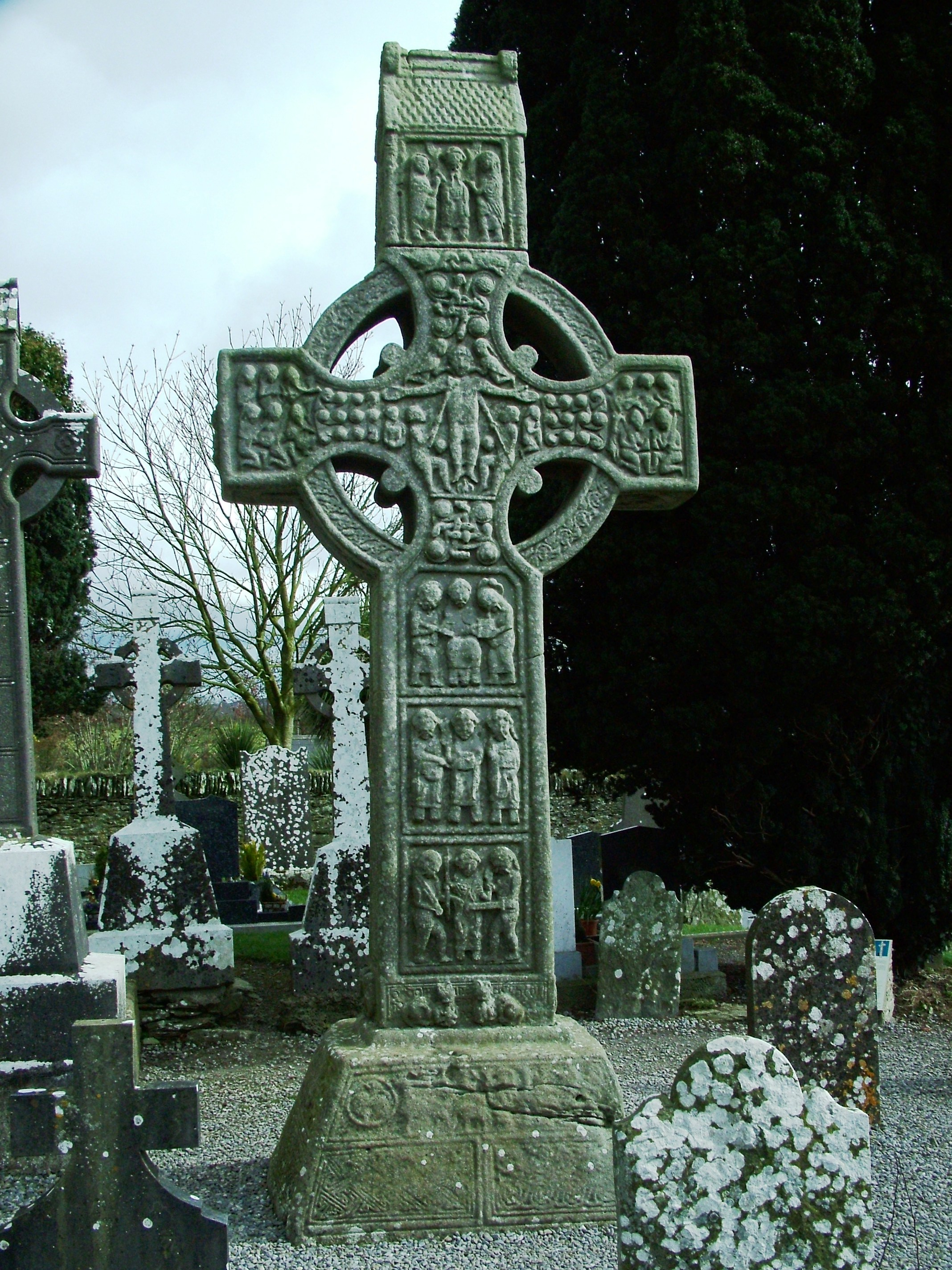 Muiredach keresztje a temetőkertben (Monasterboice, 9-10. század, Írország)